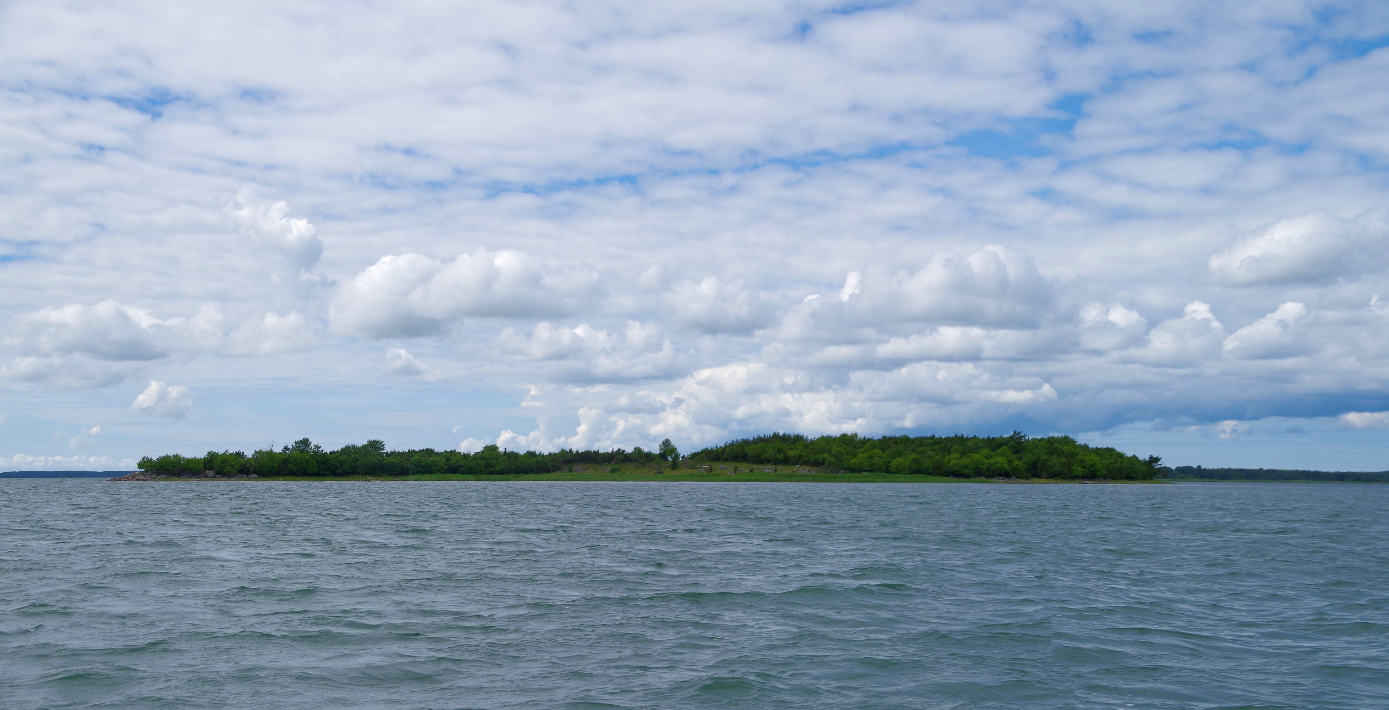 Auklaid on laid Hiiu maakonnas Soonlepa lahes. Laid kuulub Hiiumaa laidude maastikukaitsealasse.